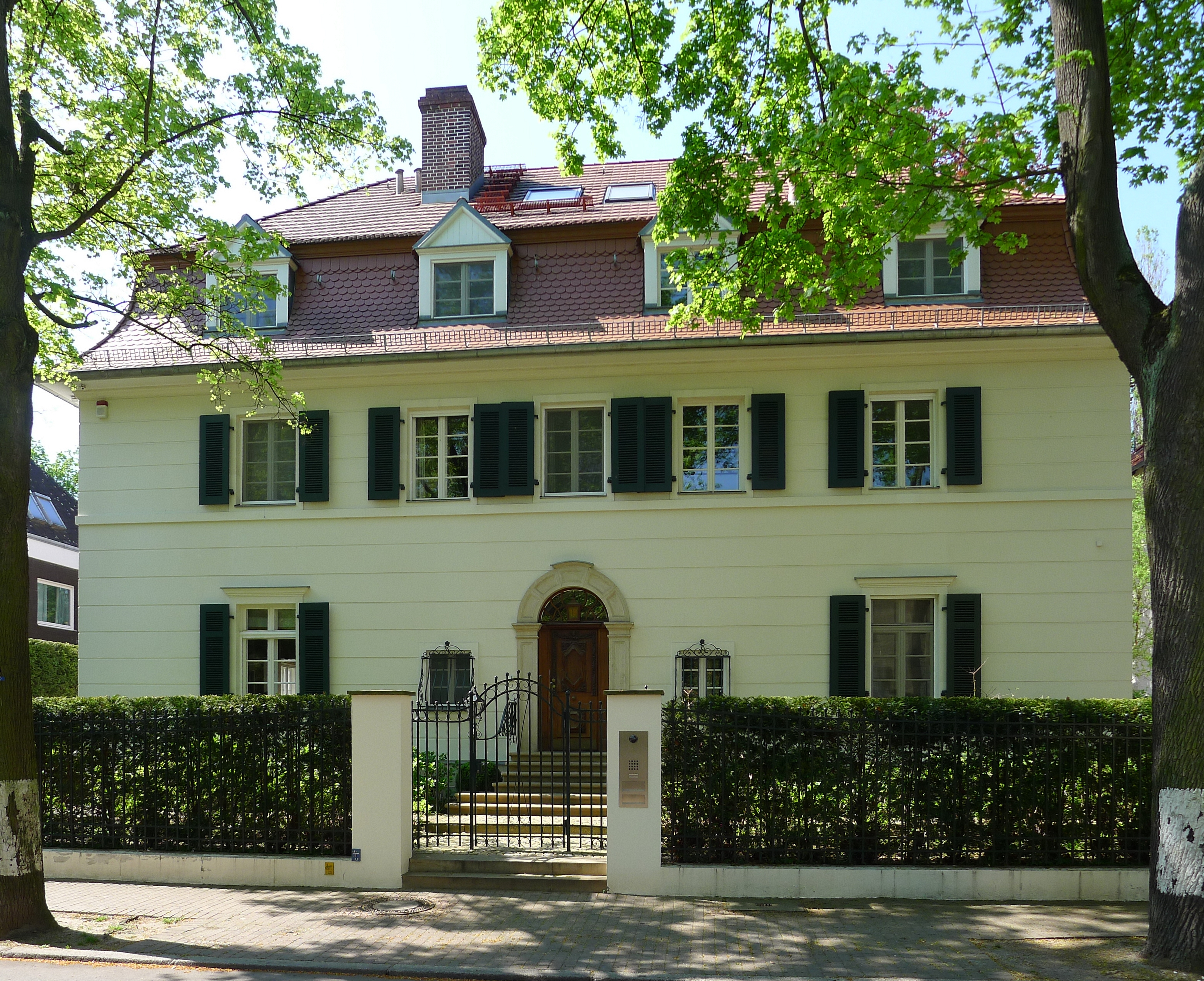 Villa